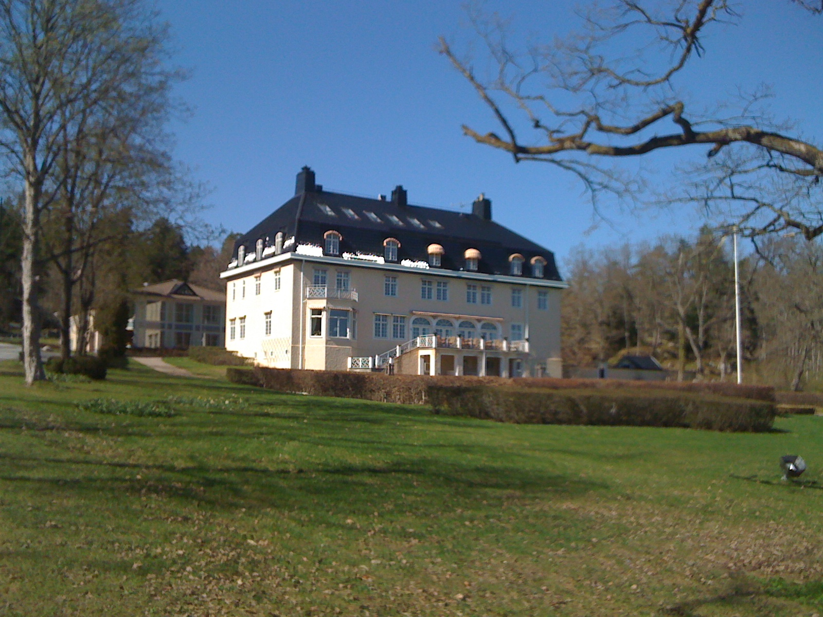 Villa Fridhem, belägen några kilometer öster om Åby, Norrköpings kommun. Ritad av Ferdinand Boberg